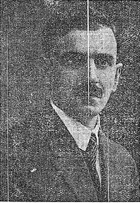 יוסף חכמי (חכמישוילי) (1886-1961).